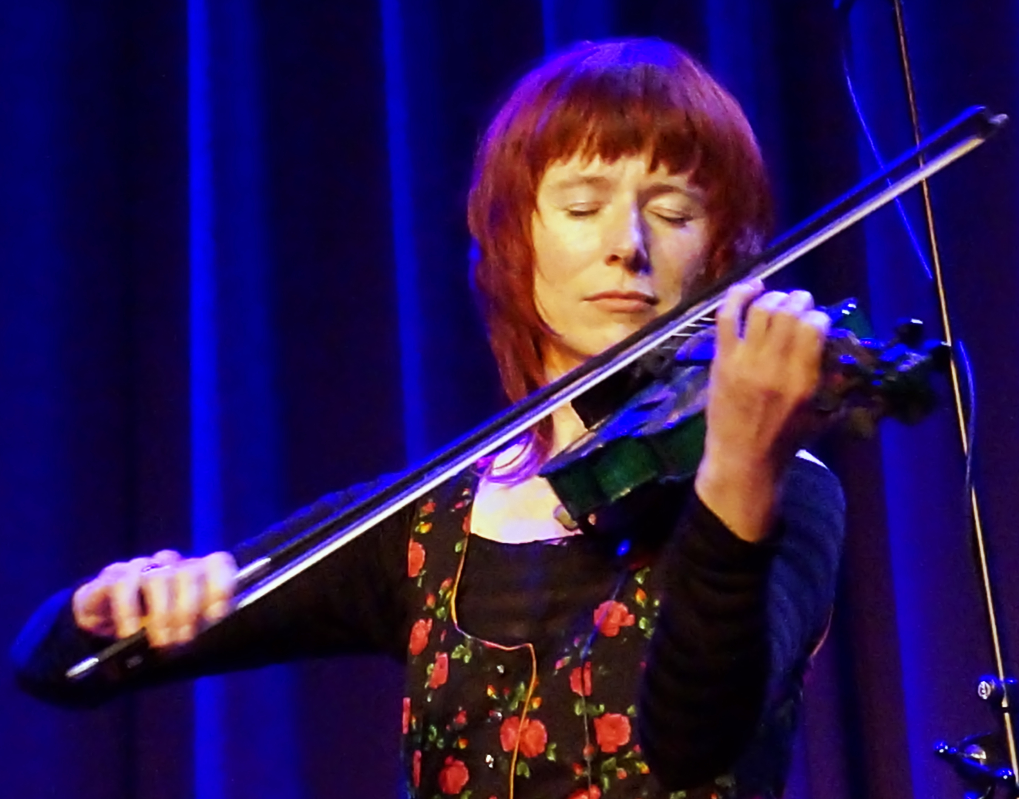 Monika Drasch aus Hengersberg in Niederbayern mit ihrem Programm "Auf der böhmischen Grenz" im Veranstaltungsforum Fürstenfeld in Fürstenfeldbruck im Juni 2013